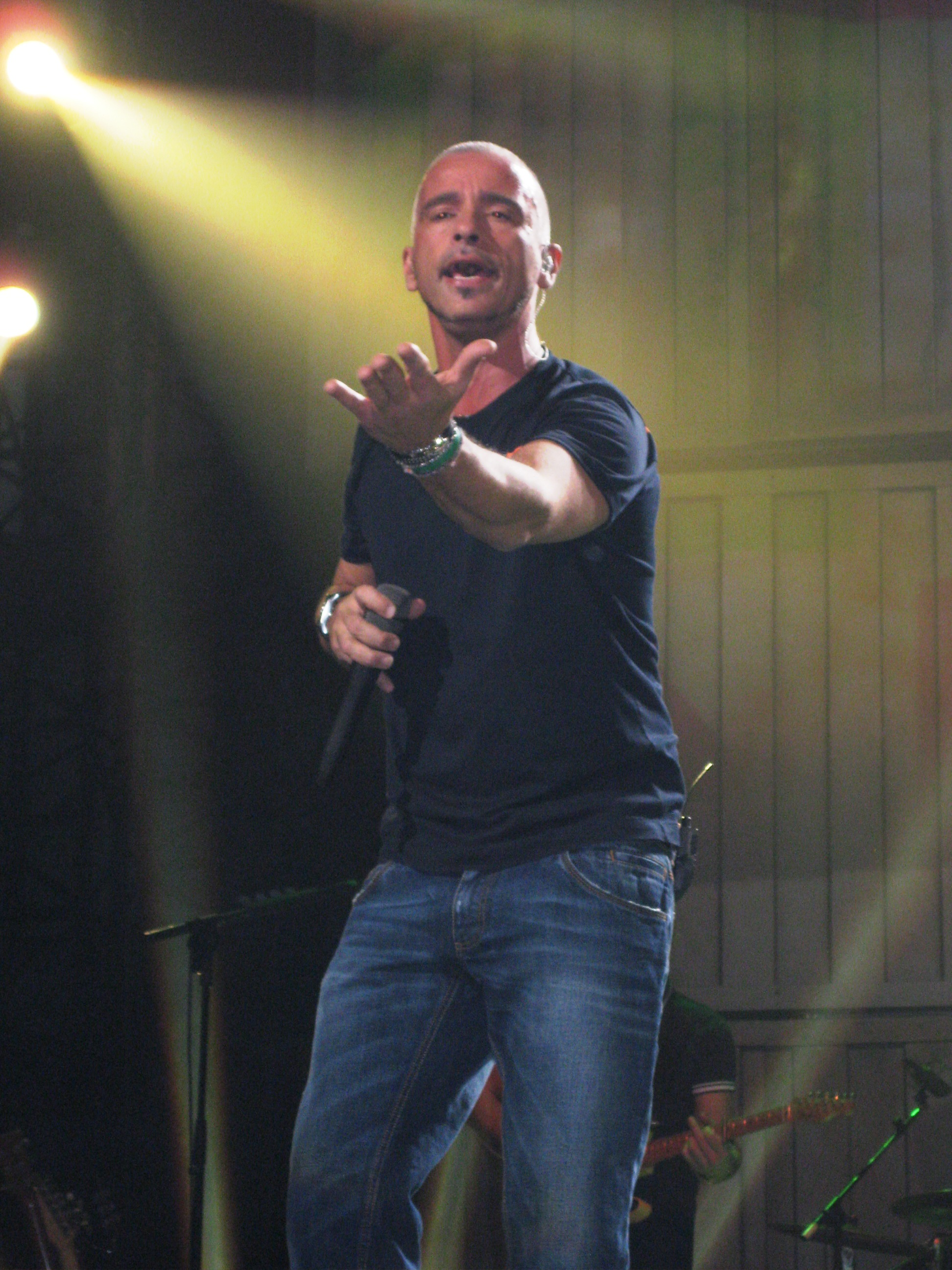 Eros-Konzert in Wien